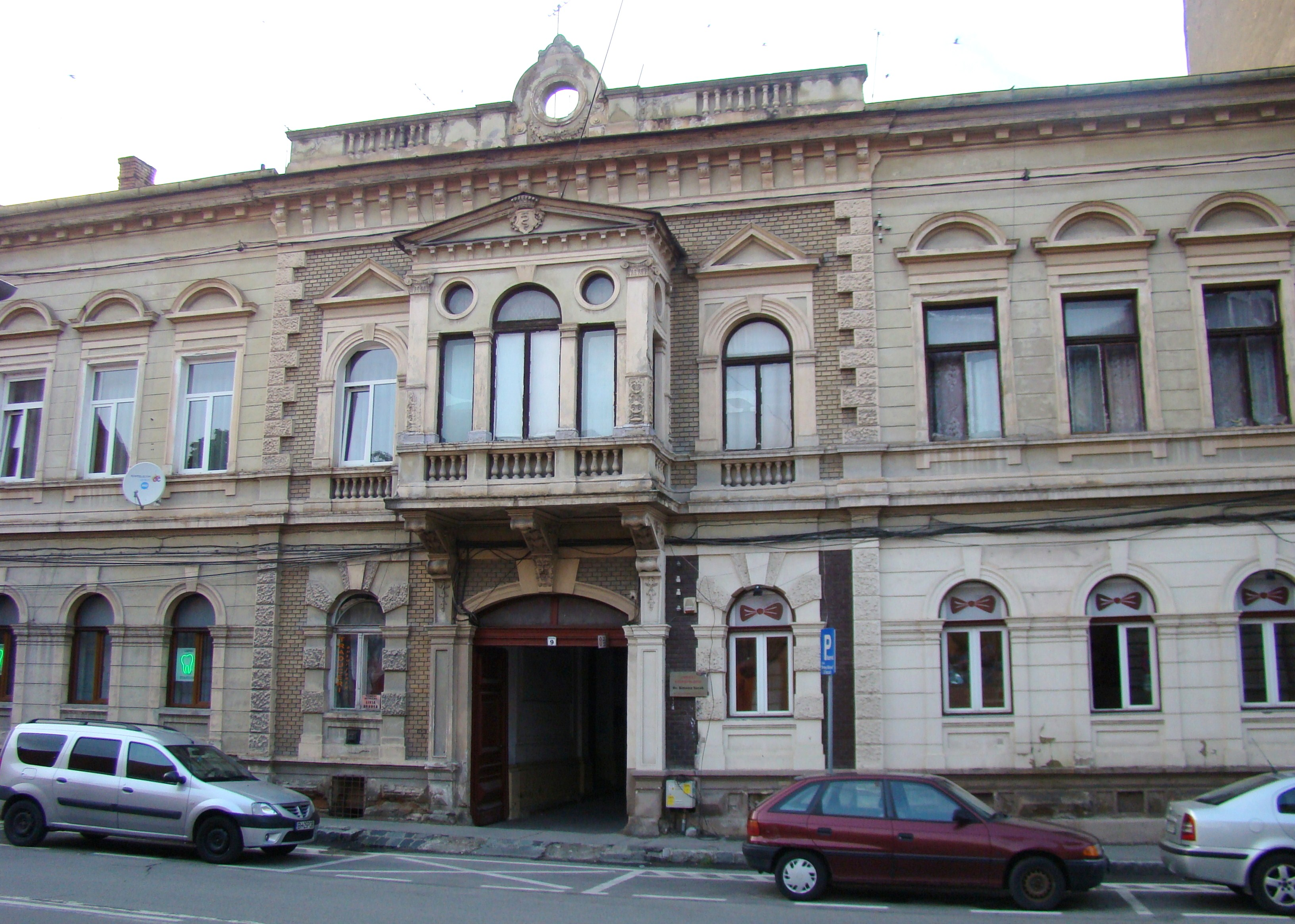 Cluj-Napoca, str.Avram Iancu nr.9